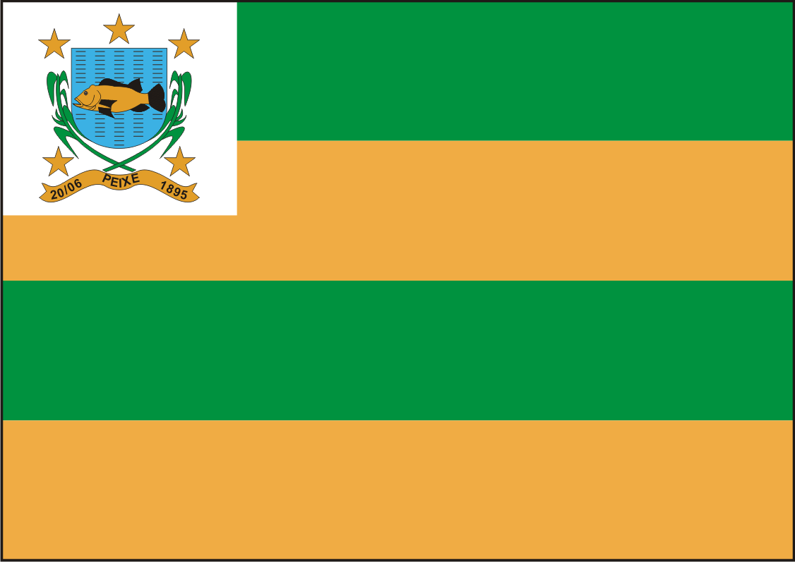 Bandeira do município de Peixe, Tocantins, Brasil.